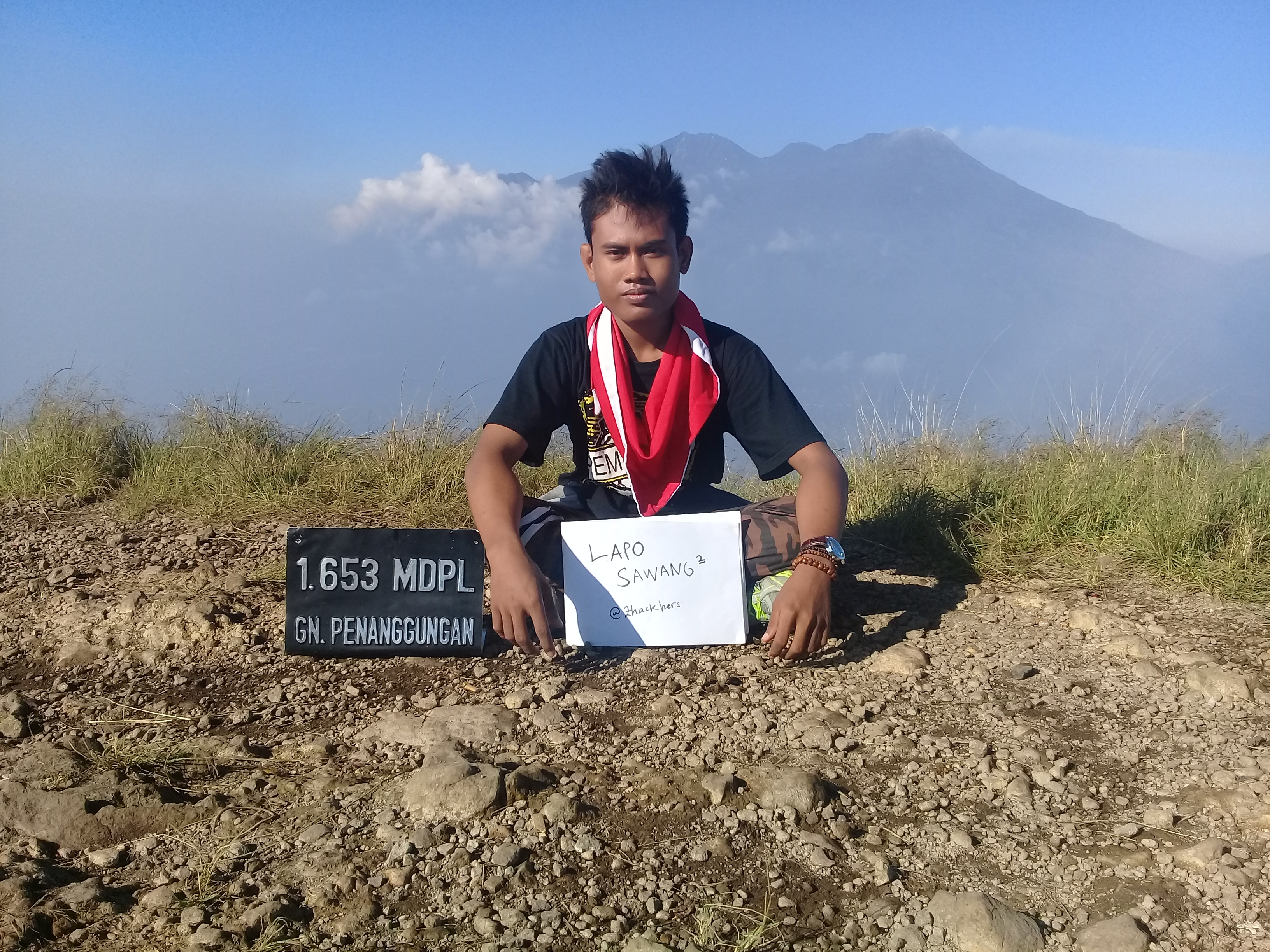 Foto kenangan di Puncak Gunung Penanggungan, Mojokerto.